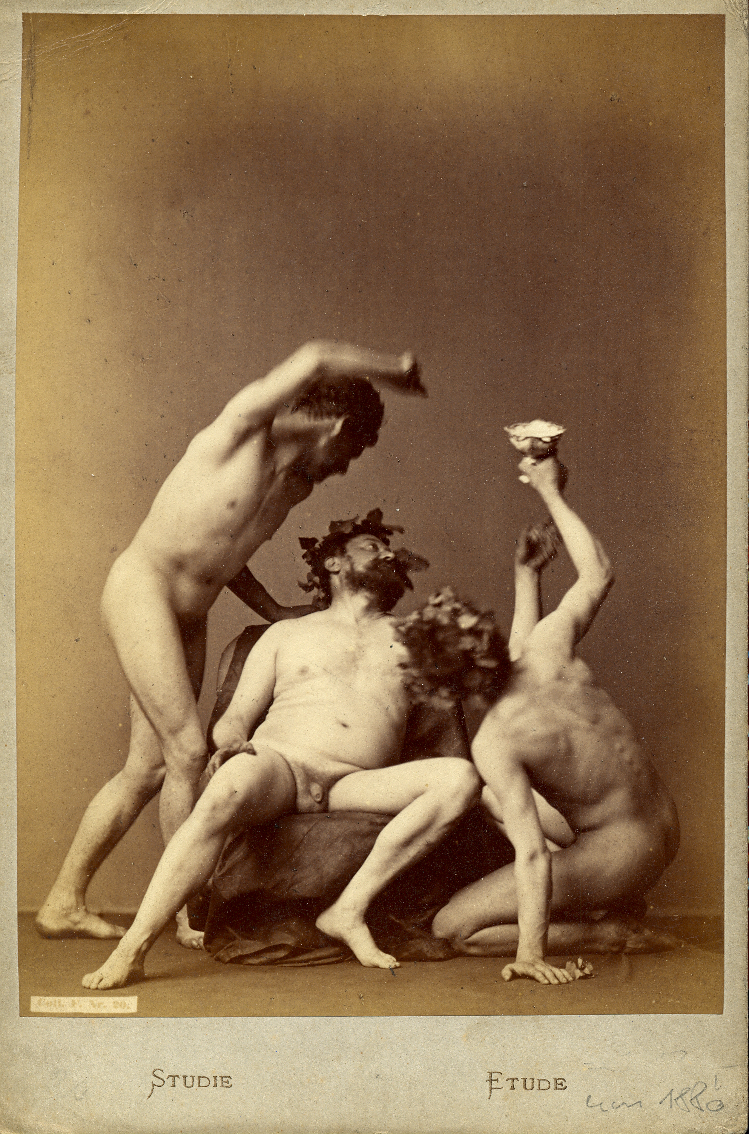 Männerakte